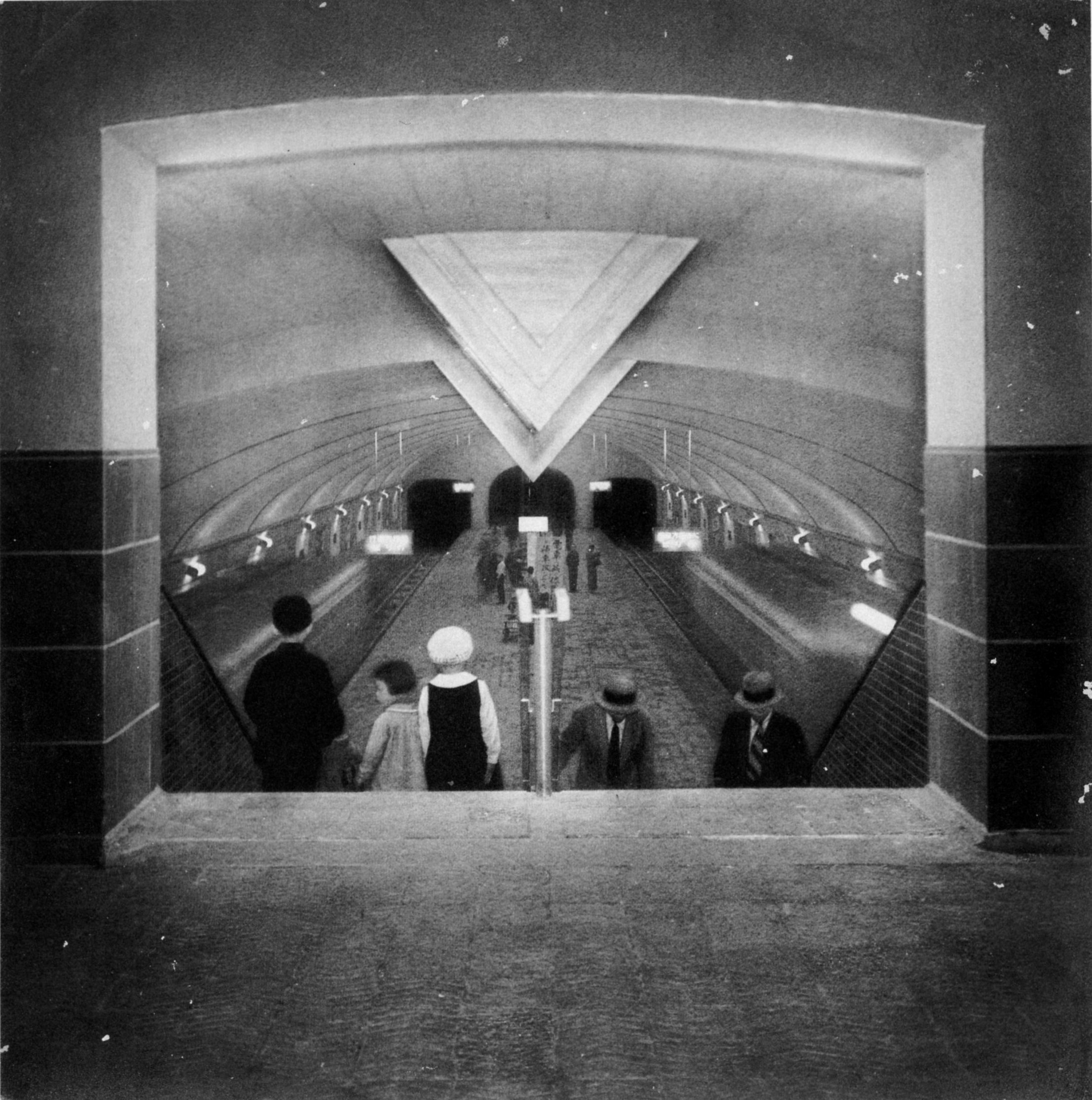 昭和8年頃の大阪市営地下鉄御堂筋線淀屋橋駅。現・大阪市中央区。撮影者は当時新大阪ホテル写真室の主任技師。